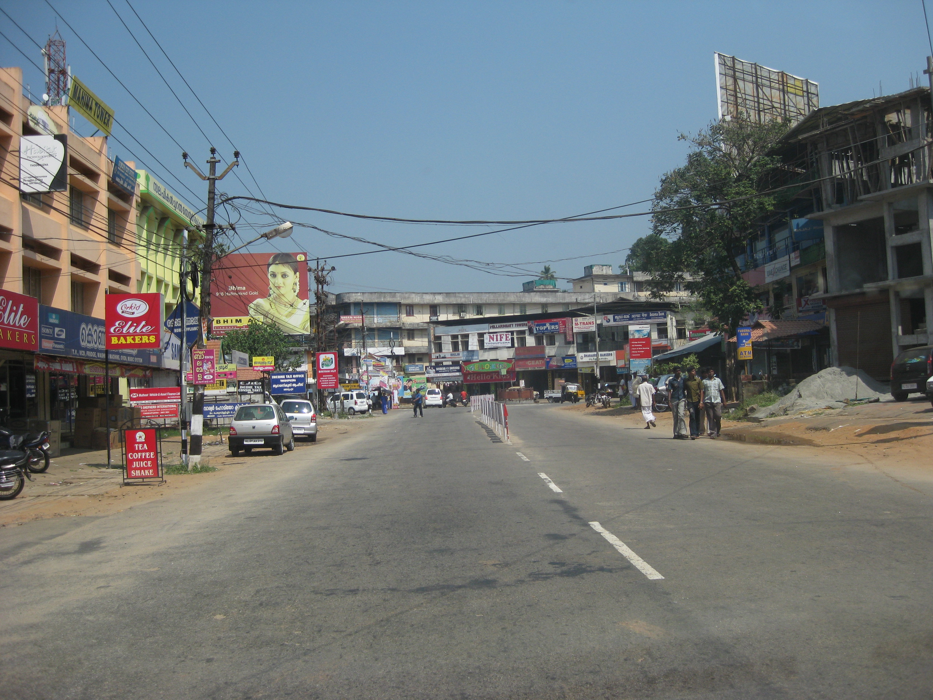 തൊടുപുഴ നഗരം ഒരു കാഴ്ച